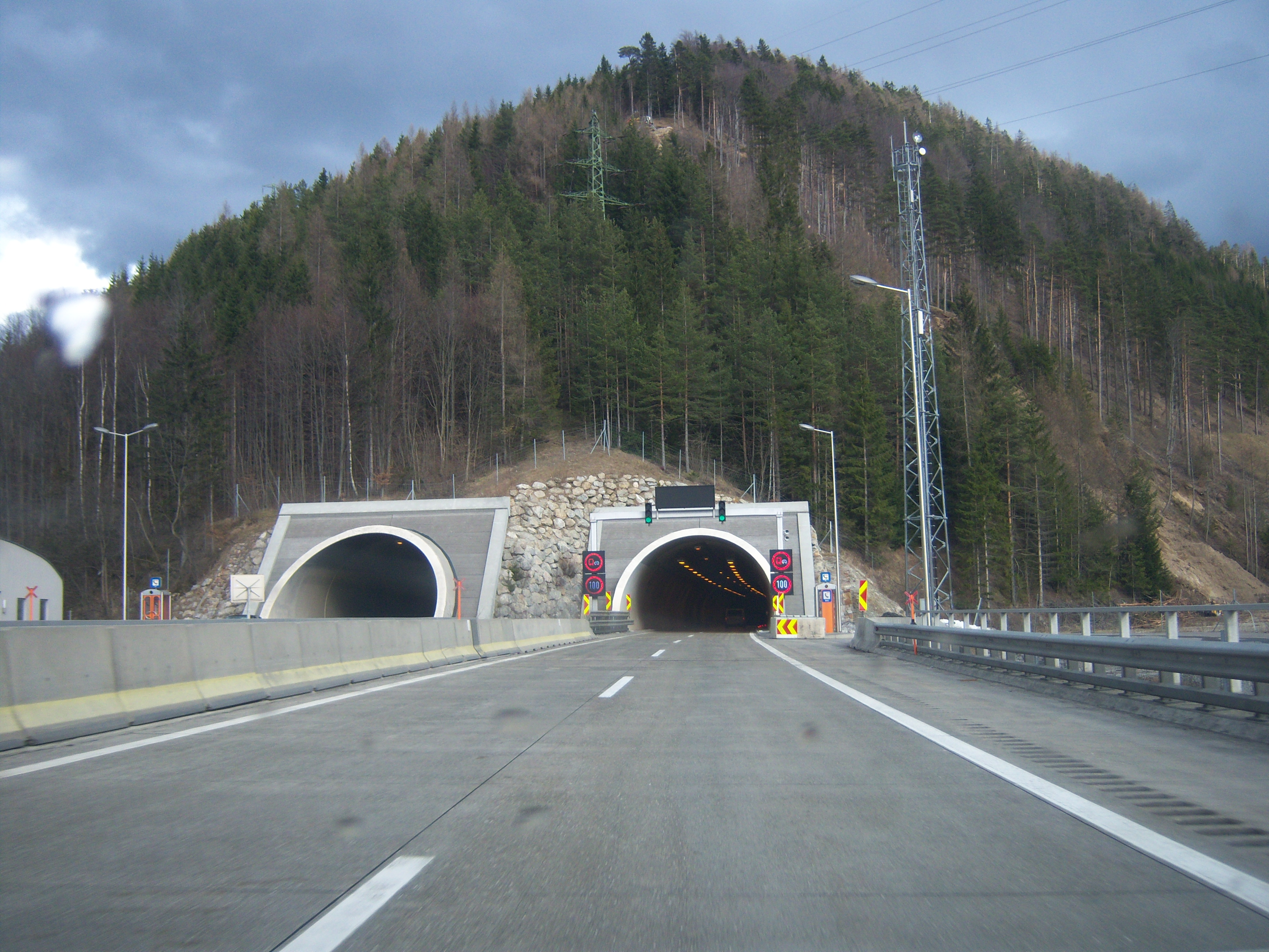 Tunnel Semmering im Zuge der Semmering Schnellstraße S6